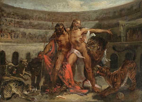 Gladiatoren im Kolosseum im antiken Rom